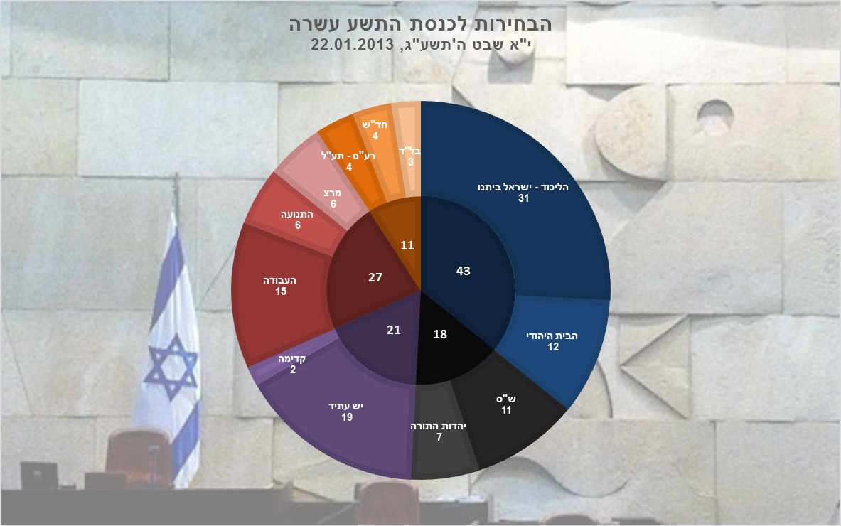 תוצאות הבחירות לכנסת התשע עשרה